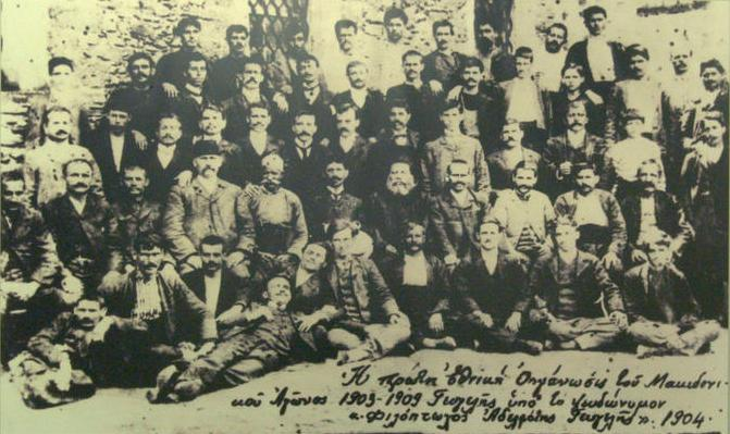 Гръцкият силогос Приятели на бедните в Гевгели, 1904.